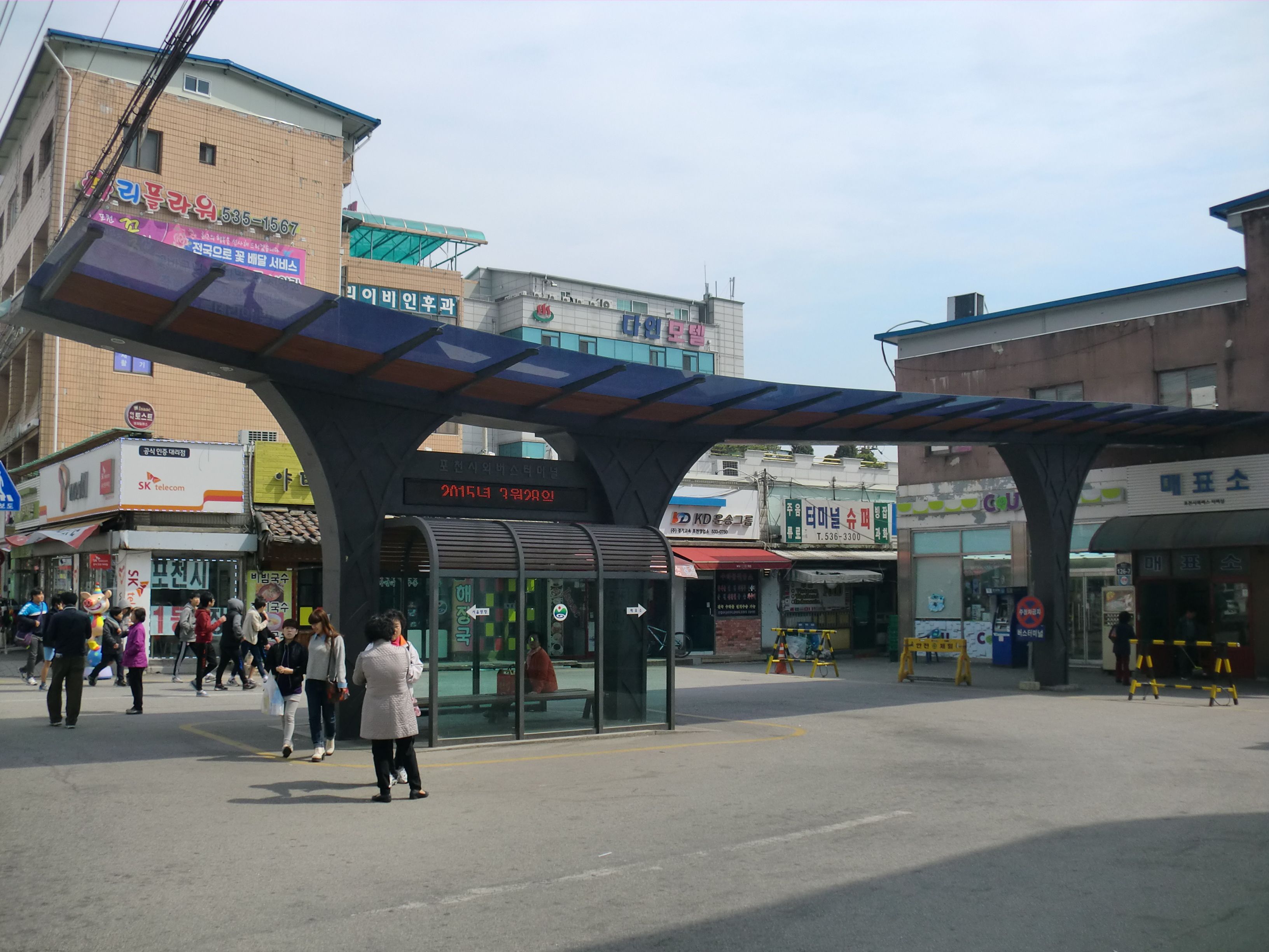 경기도 포천시에 있는 포천시외버스터미널